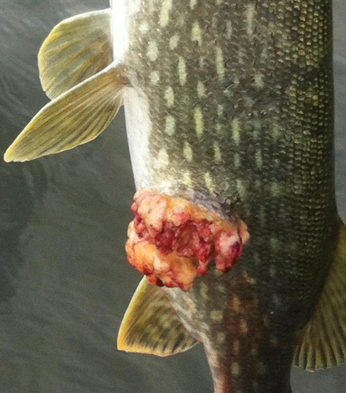 Gäddsarkom. Bild publicerad med tillstånd från upphovsmannen Thomas Björklund.